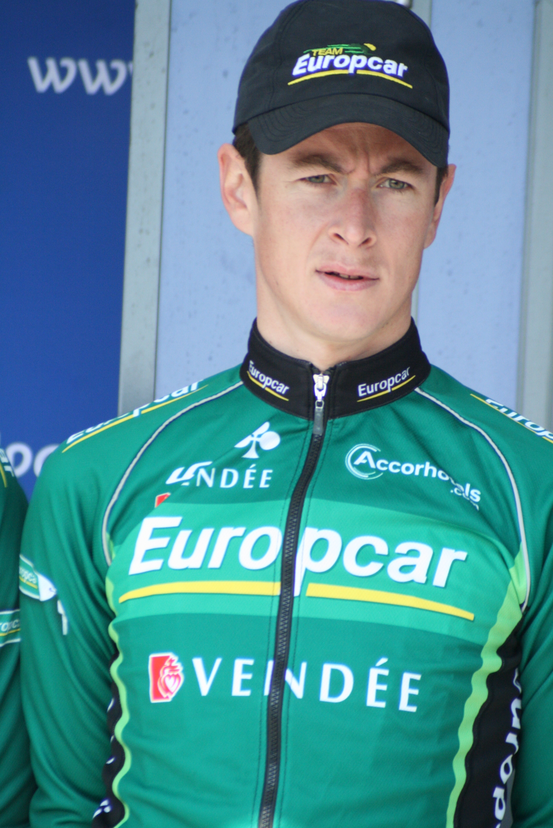 Présentation des coureurs au départ de la première étape Alexandre Pichot